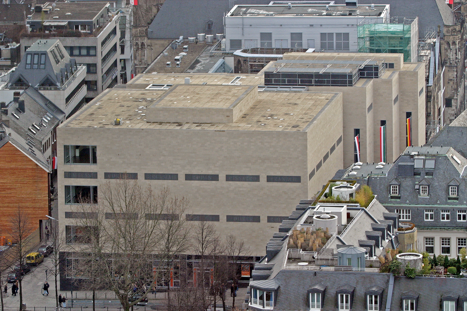 Wallraf-Richartz-Museum, Cologne. Germany